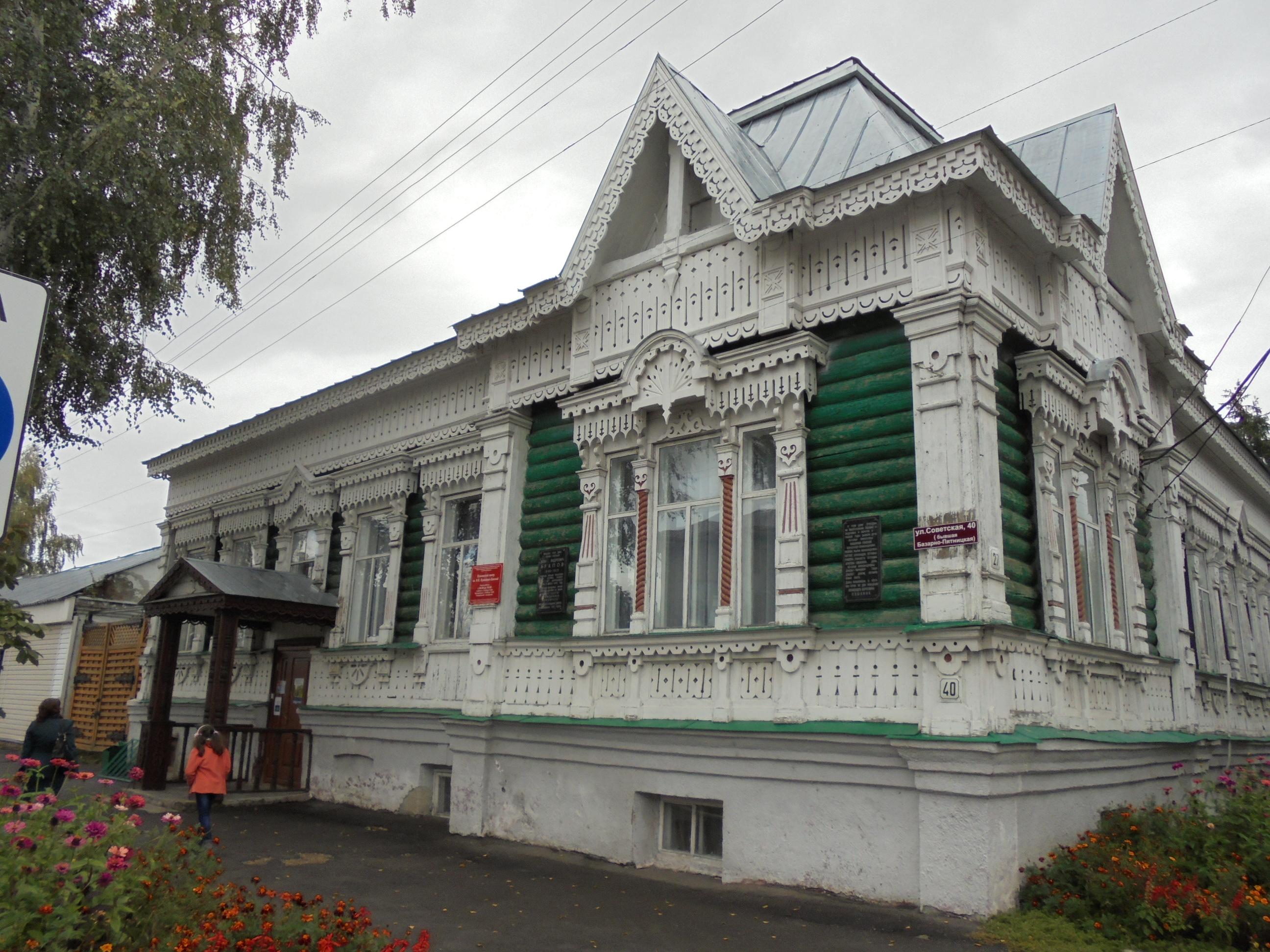 Дом Араповых (с. Наровчат Наровчатского района Пензенской области) ул. Советская, 40, бывшая Базарно-Пятницкая